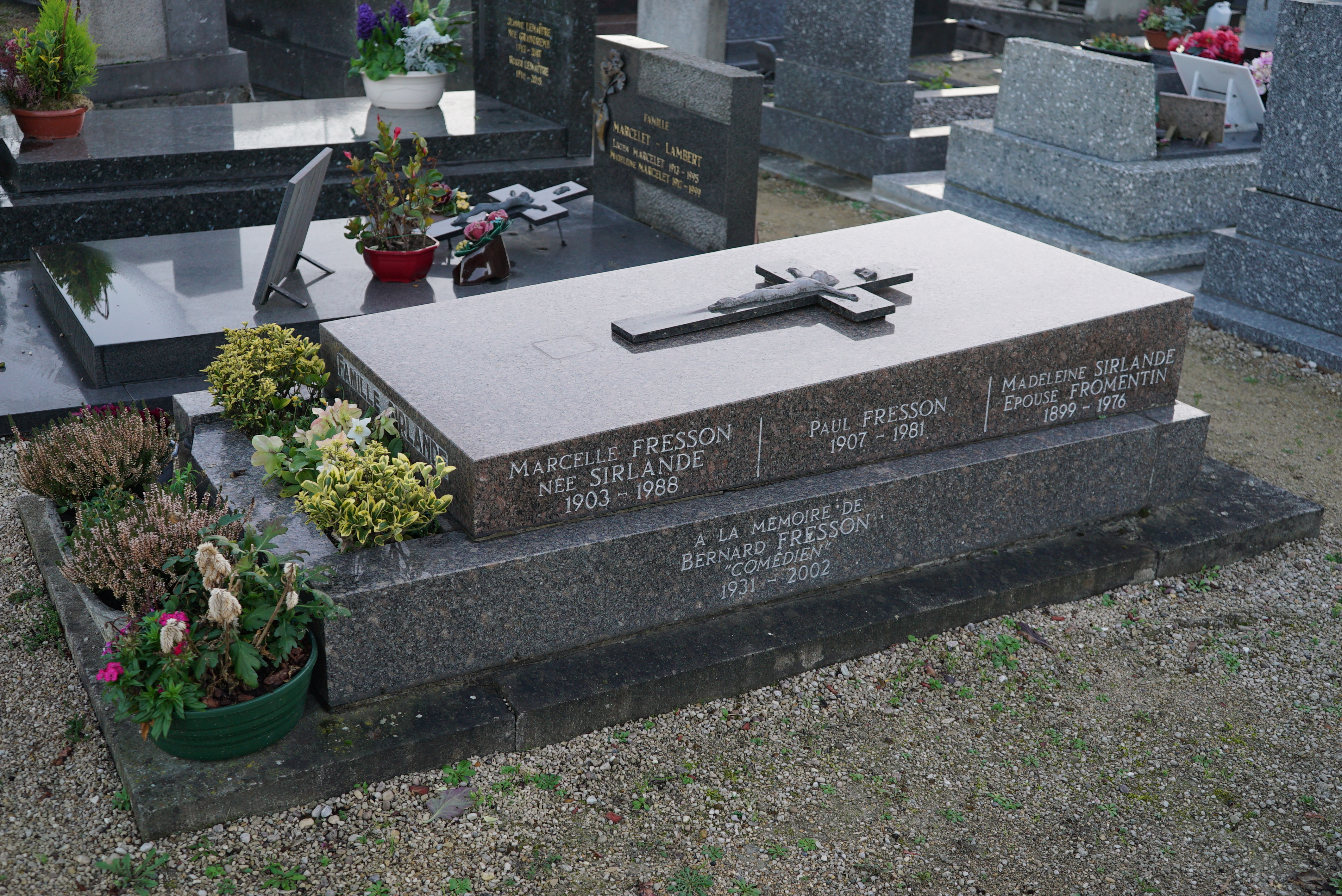 Concession SIRLANDE, au cimetière de l'est.